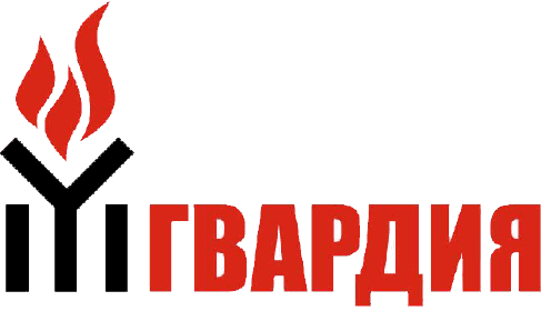 Лого на движение "ГВАРДИЯ"